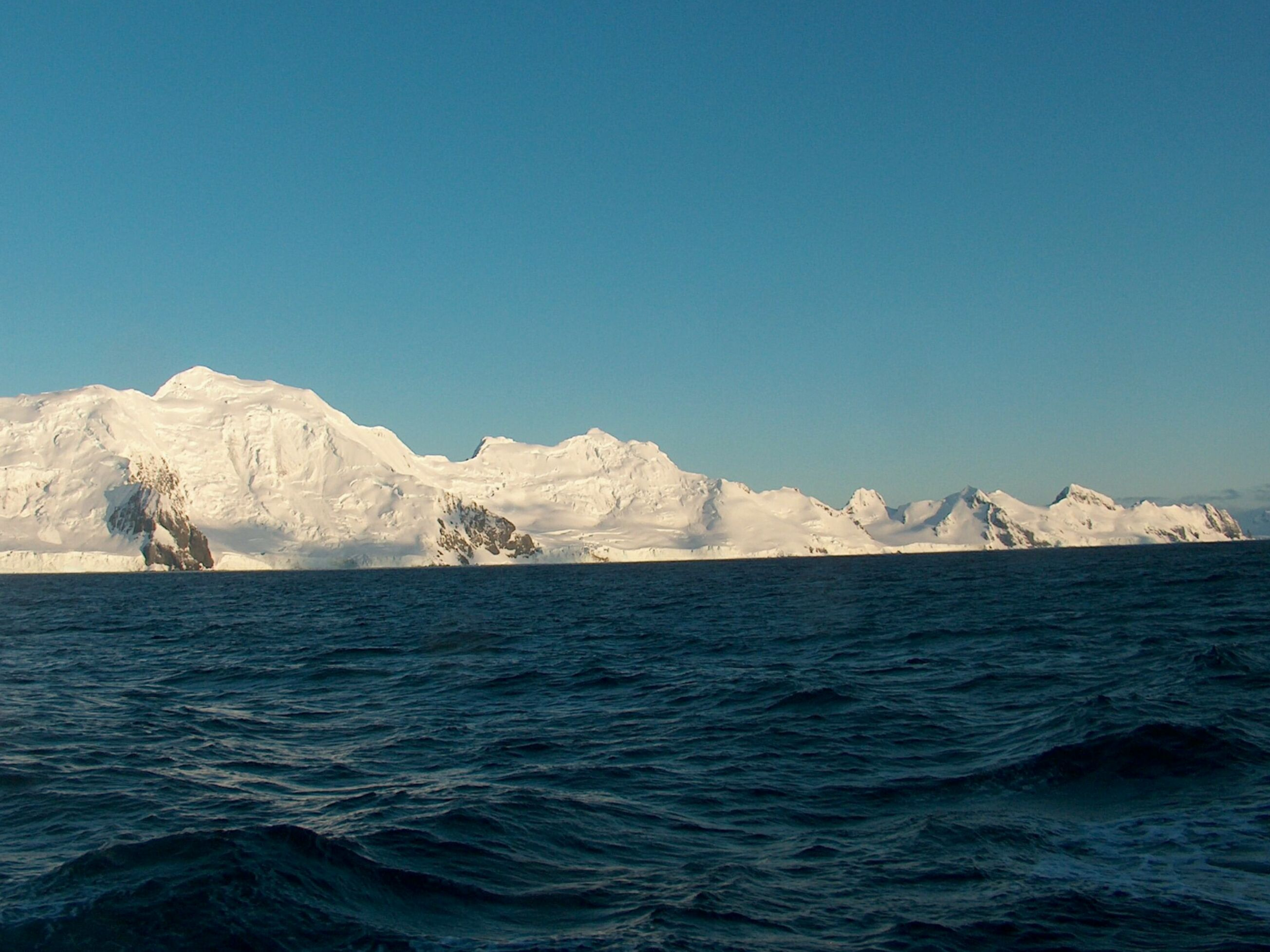 Burgas peninsula, Antarctica